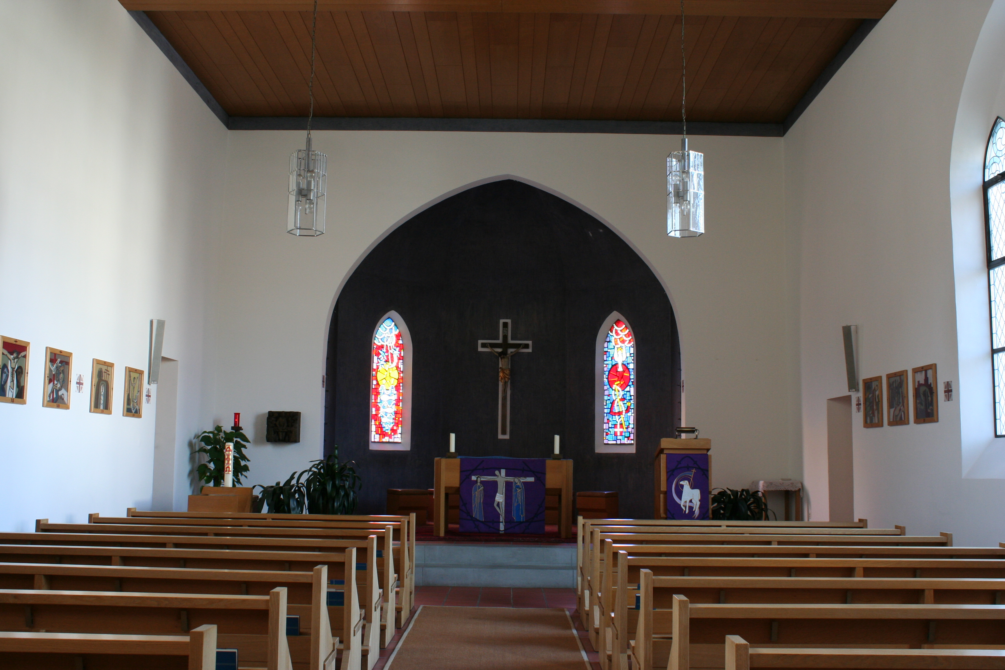 Römisch-katholische Pfarrkirche St. Anton Bauma, Kunstwerk von Johann Jakob Zemp, Innenansicht